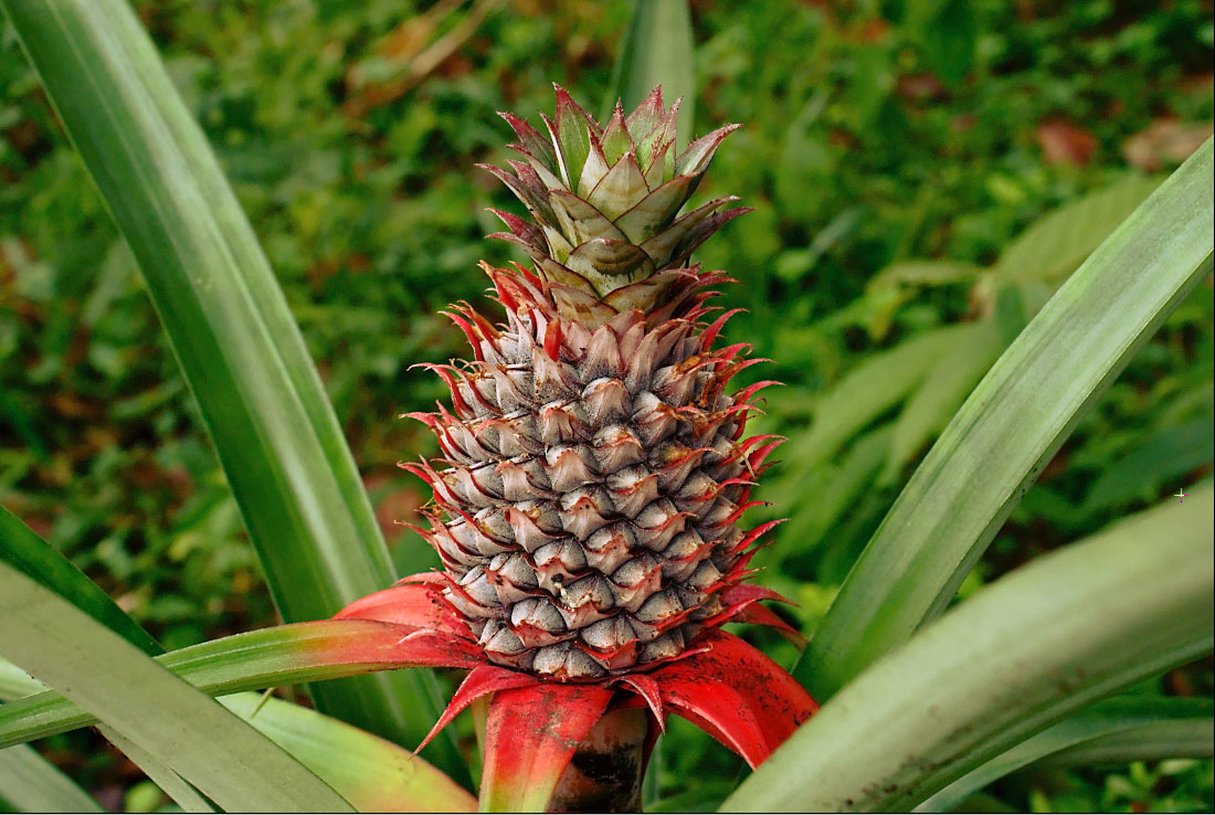 പഴുക്കാത്ത കൈതച്ചക്ക